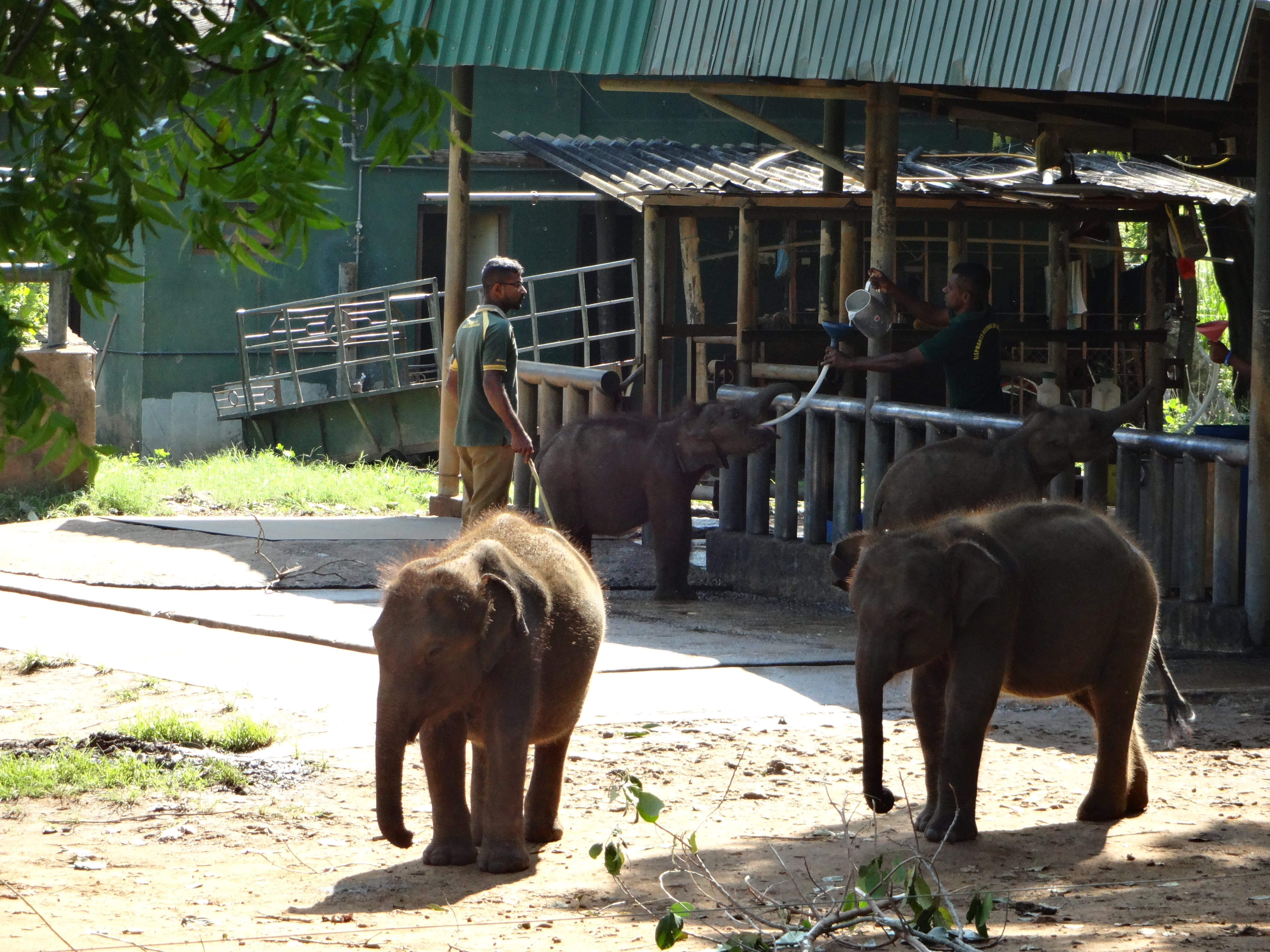 Sri-Lanka-Elefanten im Udawalawe Elephant Transit Home